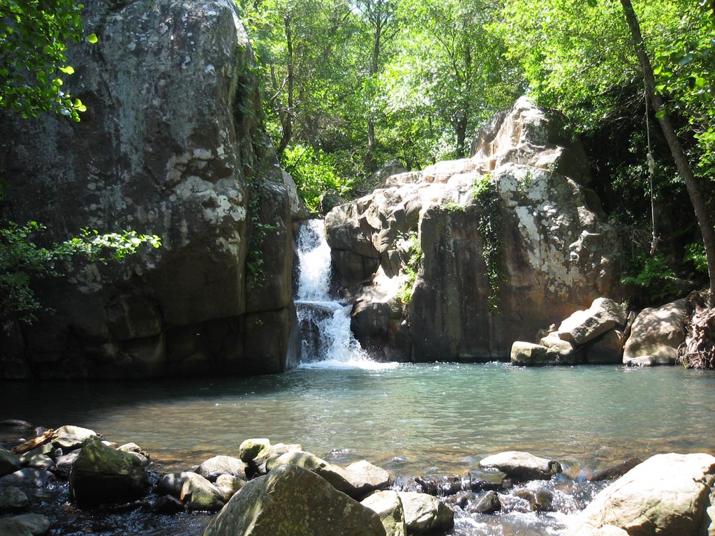 Río de la Miel, en Algeciras, Andalucia, España / Andalusia, Spain